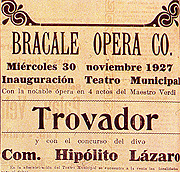 Recorte de periódico de la época que muestra la inauguración del Teatro Municipal Enrique Buenaventura